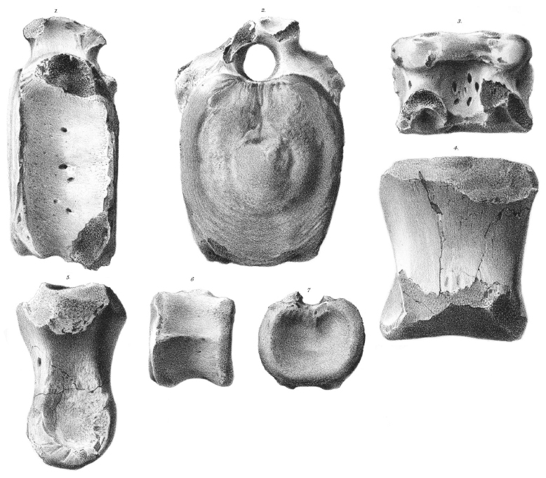 Thespesius occidentalis fossils